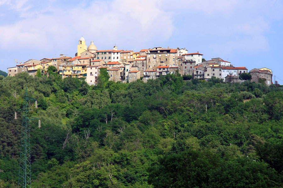 Panorama della frazione Nicola del comune di Ortonovo (SP)